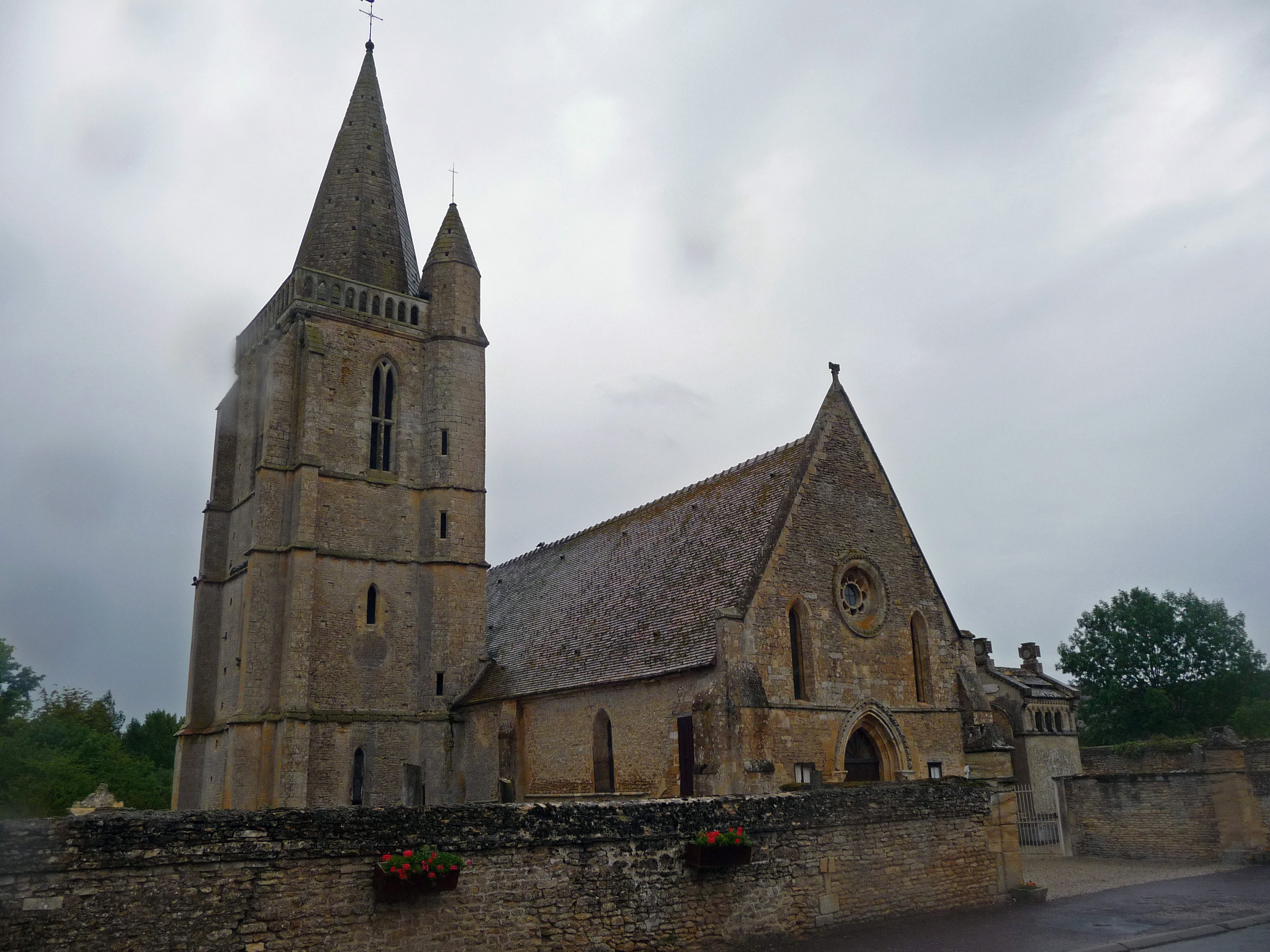 église du 13ème siècle